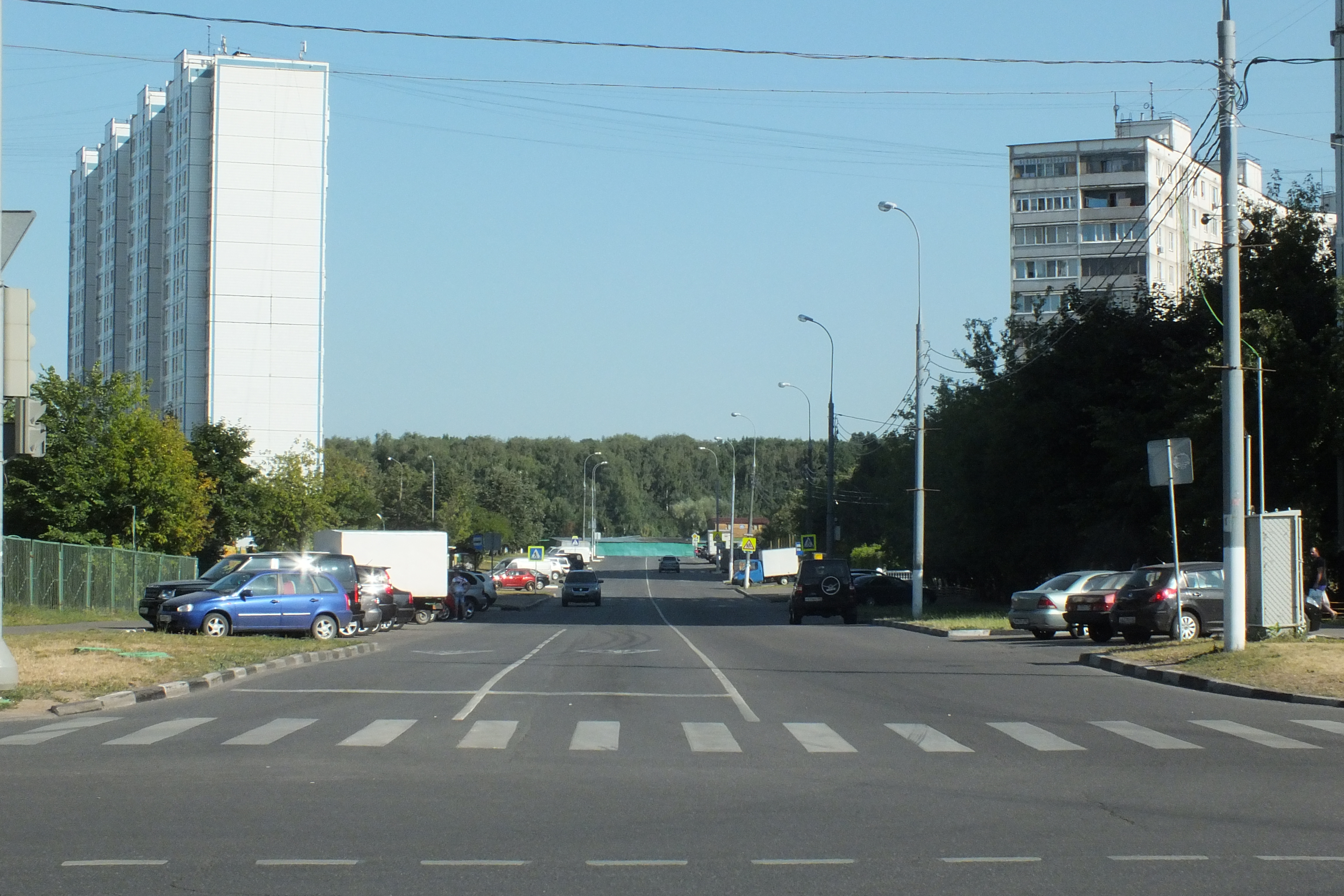 Тамбовская улица в Москве, вид от Ясеневой улицы